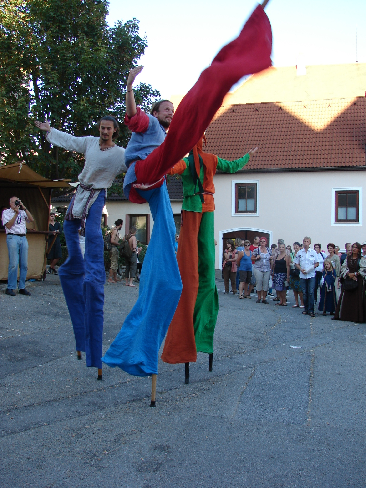 Беларуская (тарашкевіца): "DiGrease's BuffoonTheatre" in Eggenbourg, Austria - Director - A. Burnosenka - Театра Огня "Плутовской Театр ДиГриза", режиссер А. Бурносенко - гастроли в г. Эггенбург, Австрия.